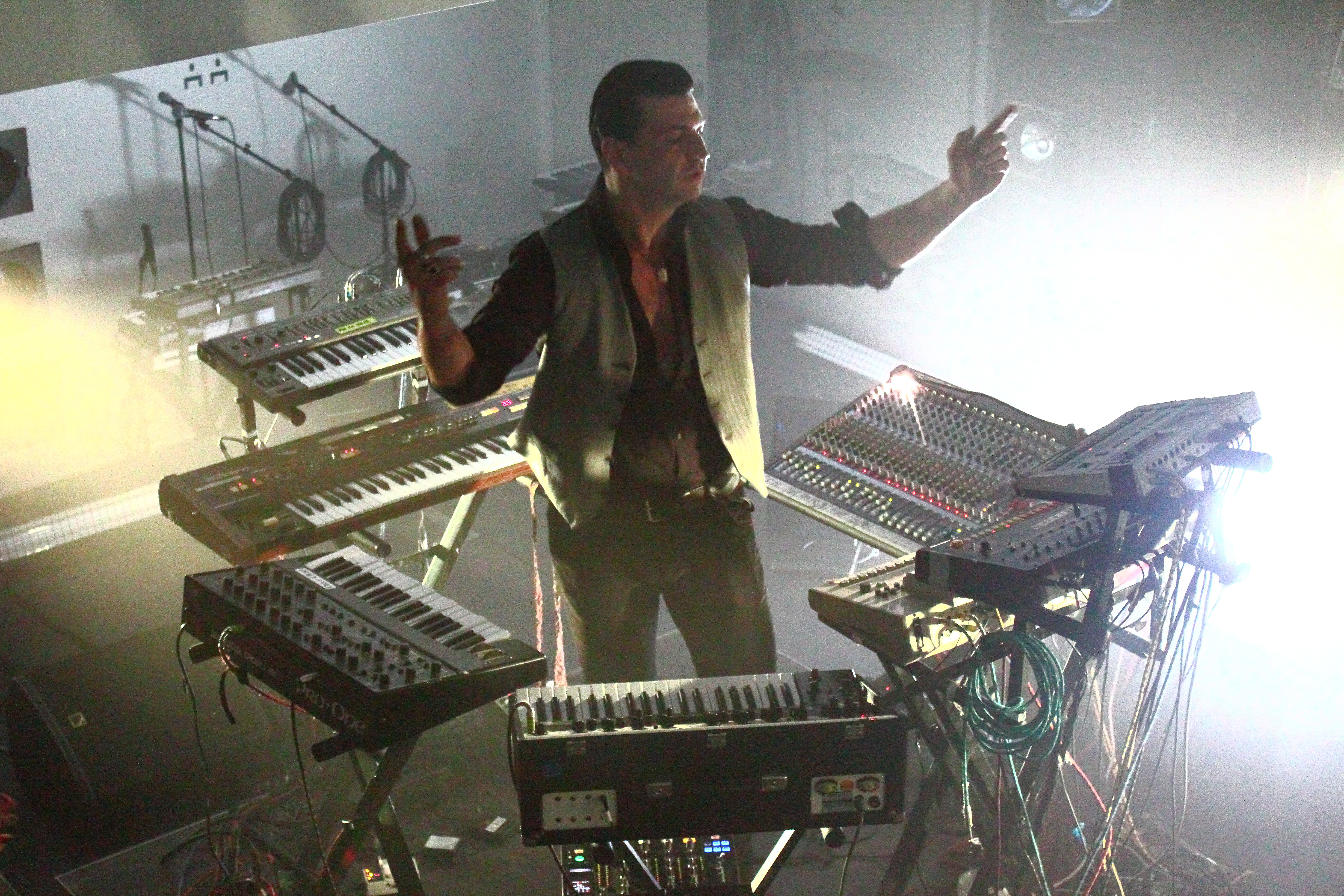 Arnaud Rebotini in 2013